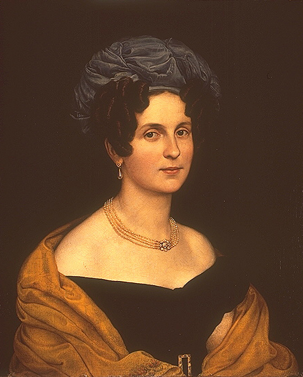 Porträt der Berliner Sängerin Karoline Seidler-Wranitzky. Berlin, Nationalgalerie